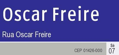 Toponimo da rua oscar freire